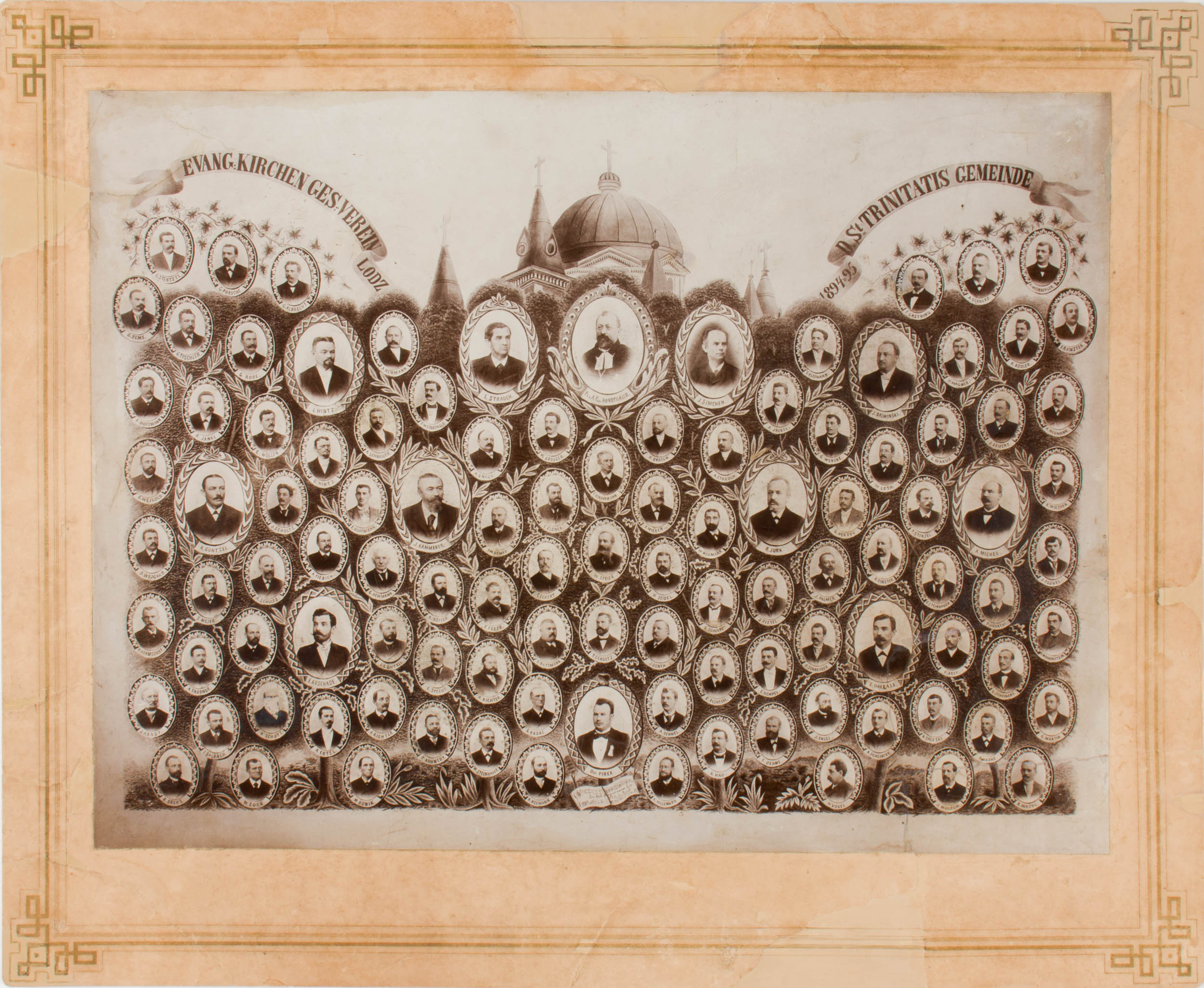 Tableau przedstawiające członków Ewangelickiego (męskiego) Towarzystwa Śpiewaczego przy kościele św. Trójcy mieszczącym się na Nowym Rynku (ob. Plac Wolności)w Łodzi w latach 1894-1895